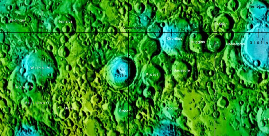 Cráter lunar Tycho. Localización. (Imagen LRO)